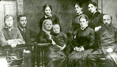 семья пианистки Зограф-Плаксиной, Валентины Юрьевны